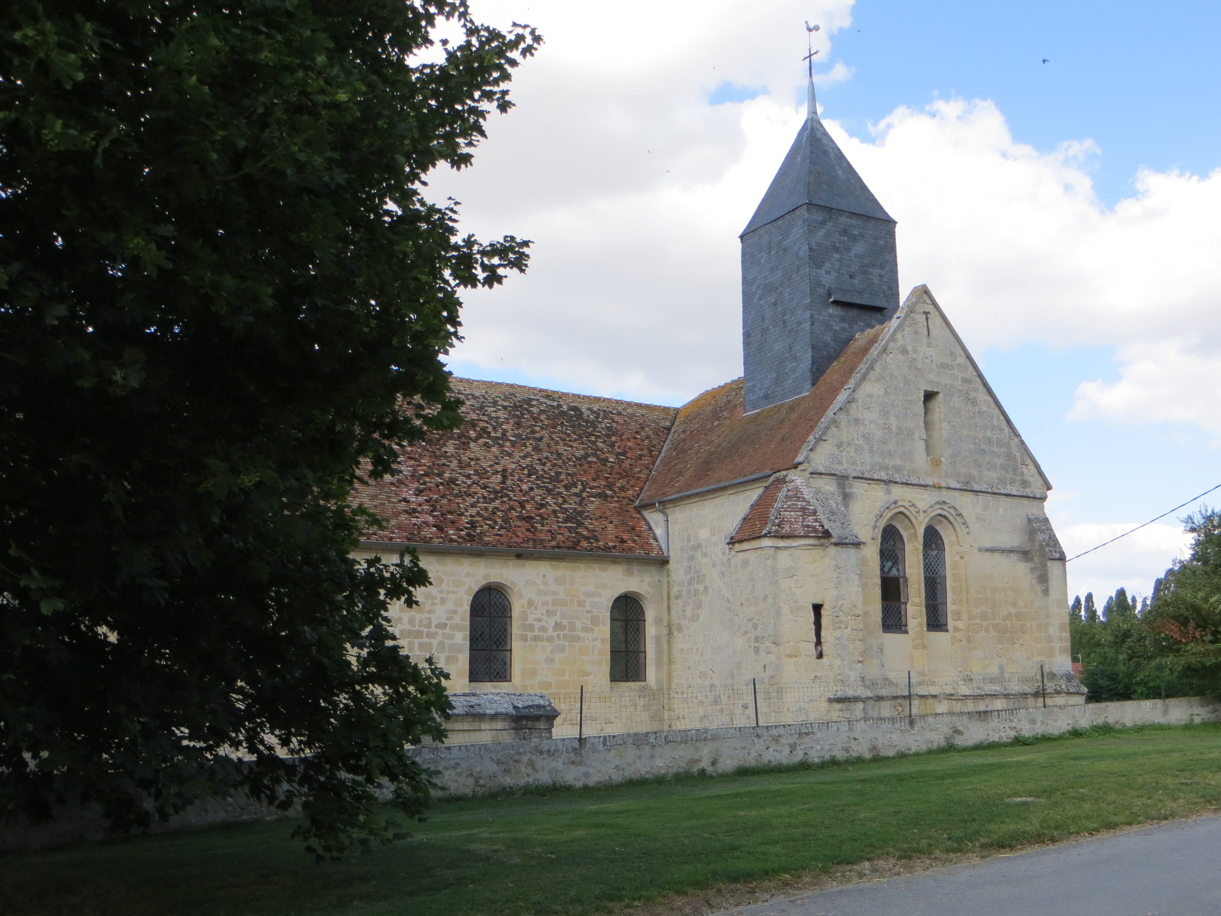 Vue générale de l'église